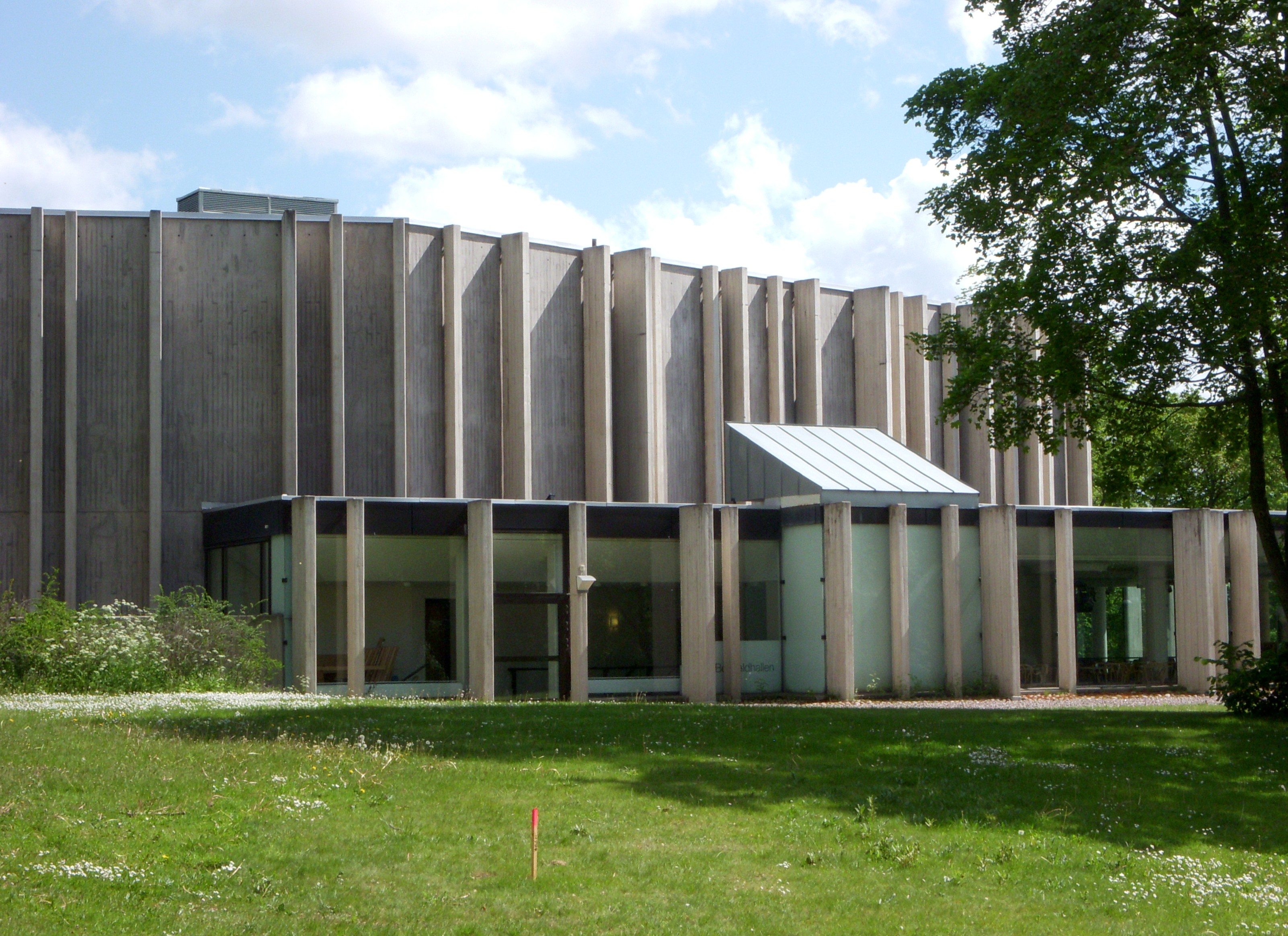 Berwaldhallen i Stockholm, fasad mot väst